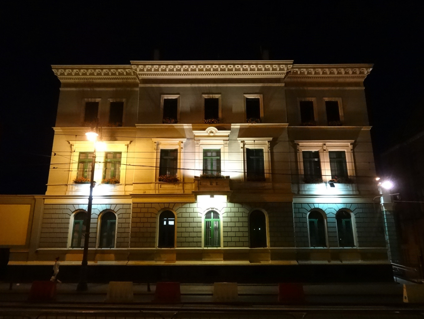 Budynek oddziału NBP w Bydgoszczy przy ul. Jagiellońskiej